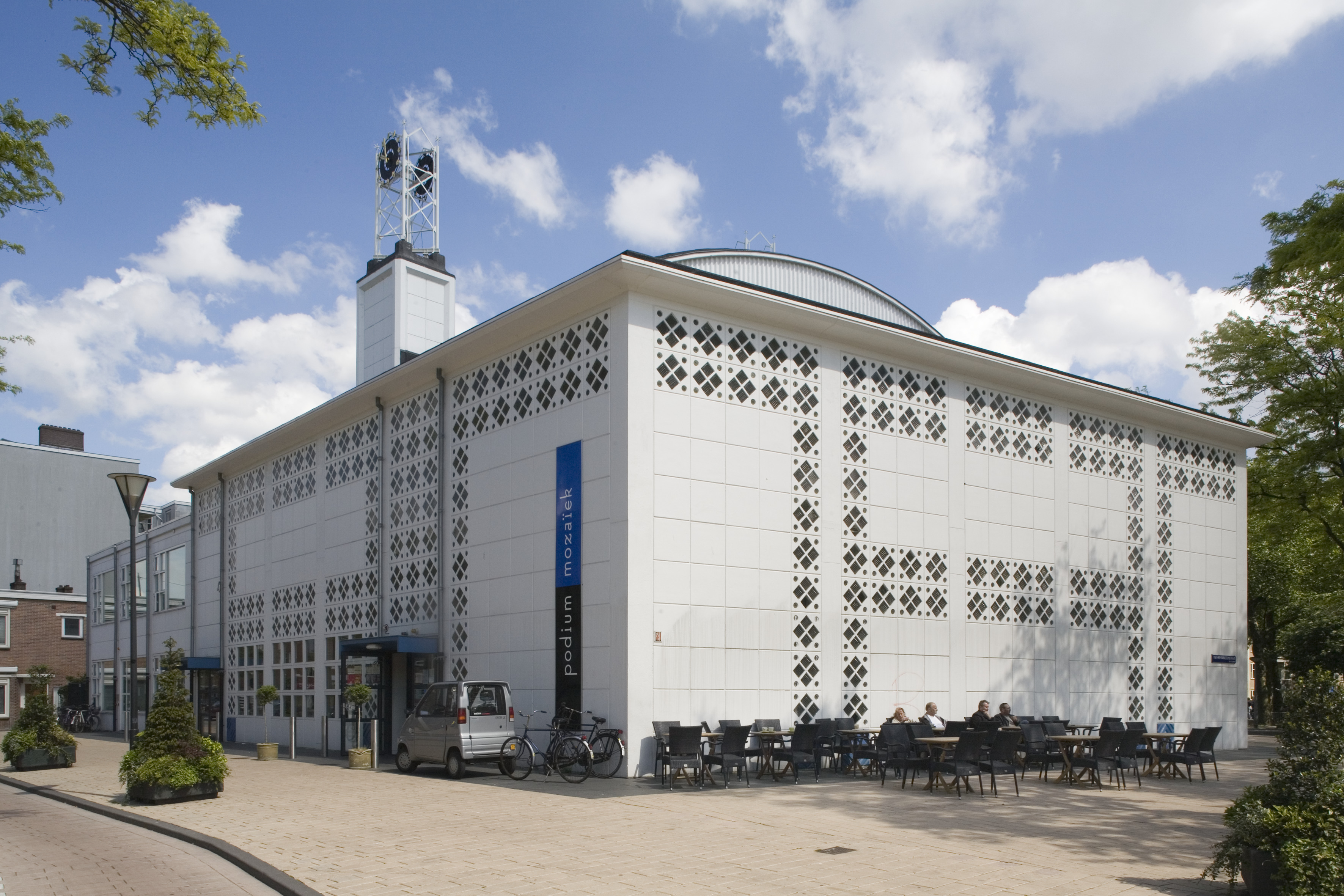 Pniëlkerk: Overzicht van de west en zuidgevel